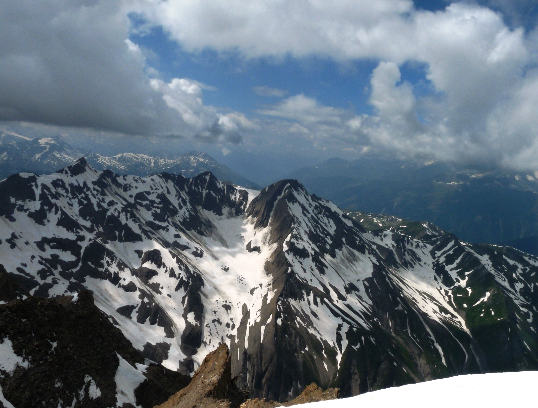 Il Rappehorn/Mittaghorn (a destra), l'Ober Rappehorn (al centro) ed il Turbhorn (a sinistra) visti dalla cima del Blinnenhorn.